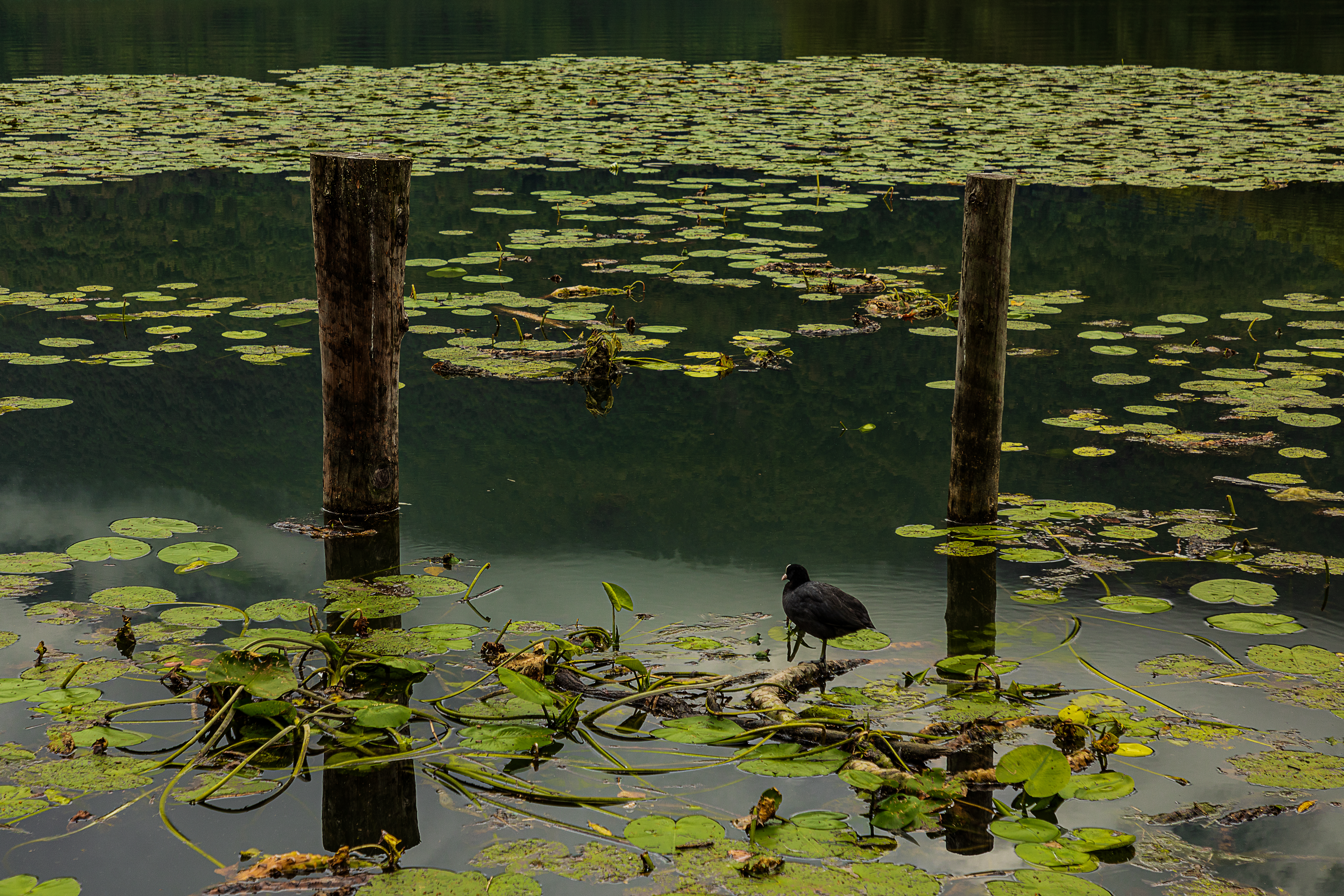 riserva naturale Lago di Piano This is a photo of a monument which is part of cultural heritage of Italy.